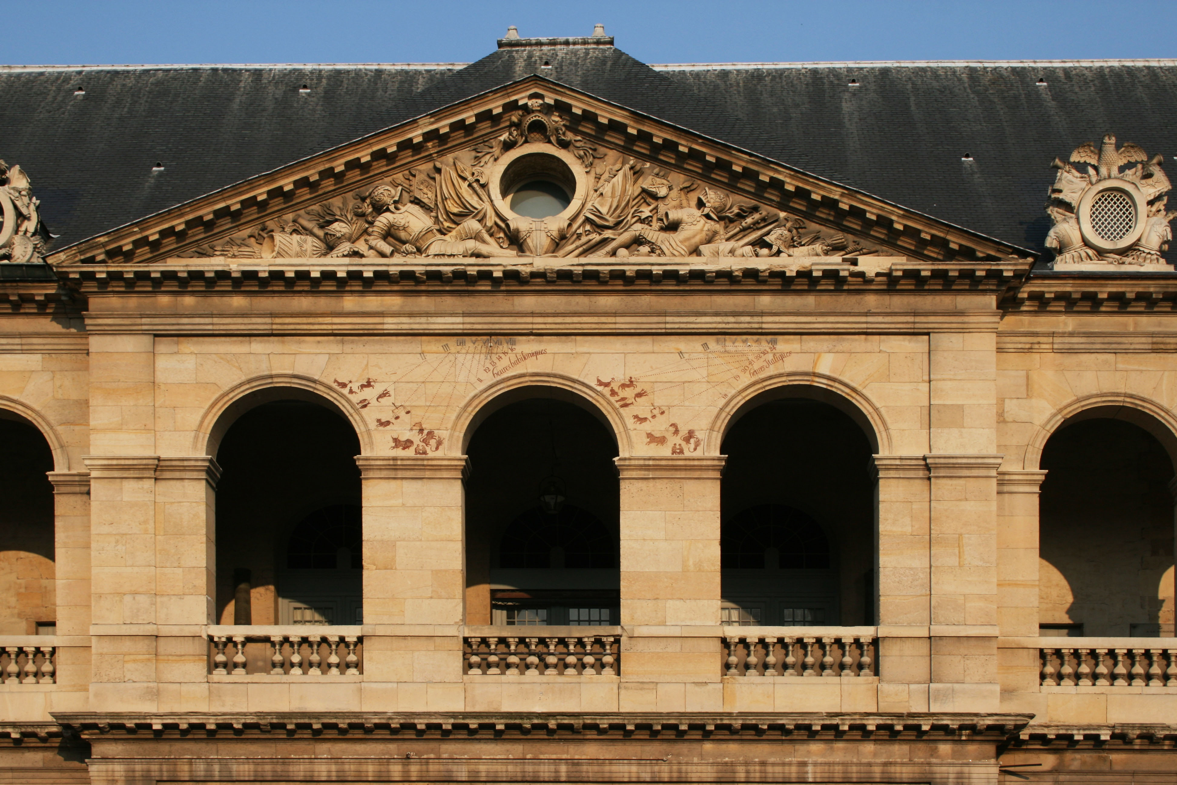 Cour intérieure de l'Hotel des Invalides